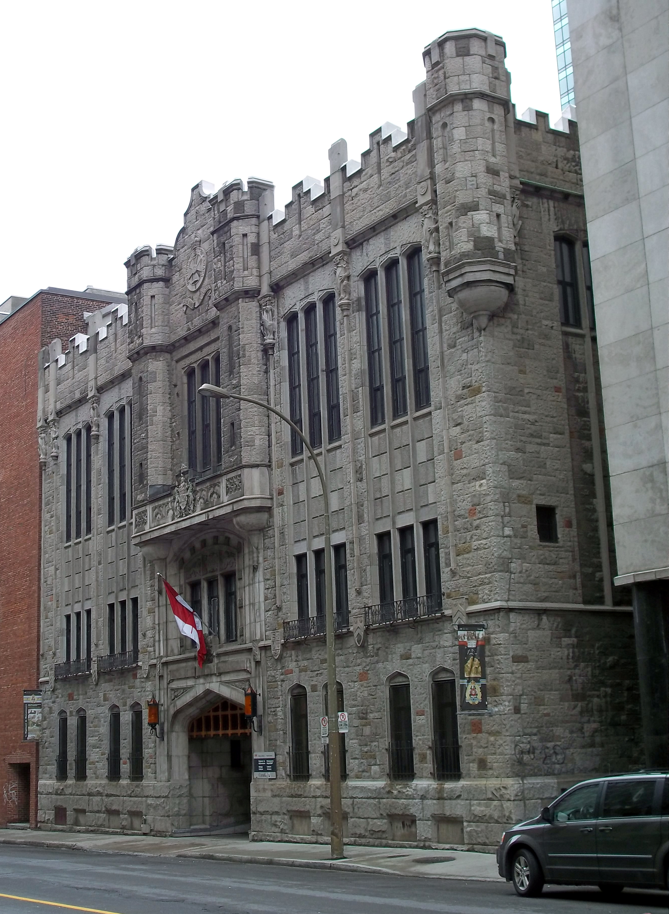 Manège Cathcart, régiment de Maisonneuve, Montréal